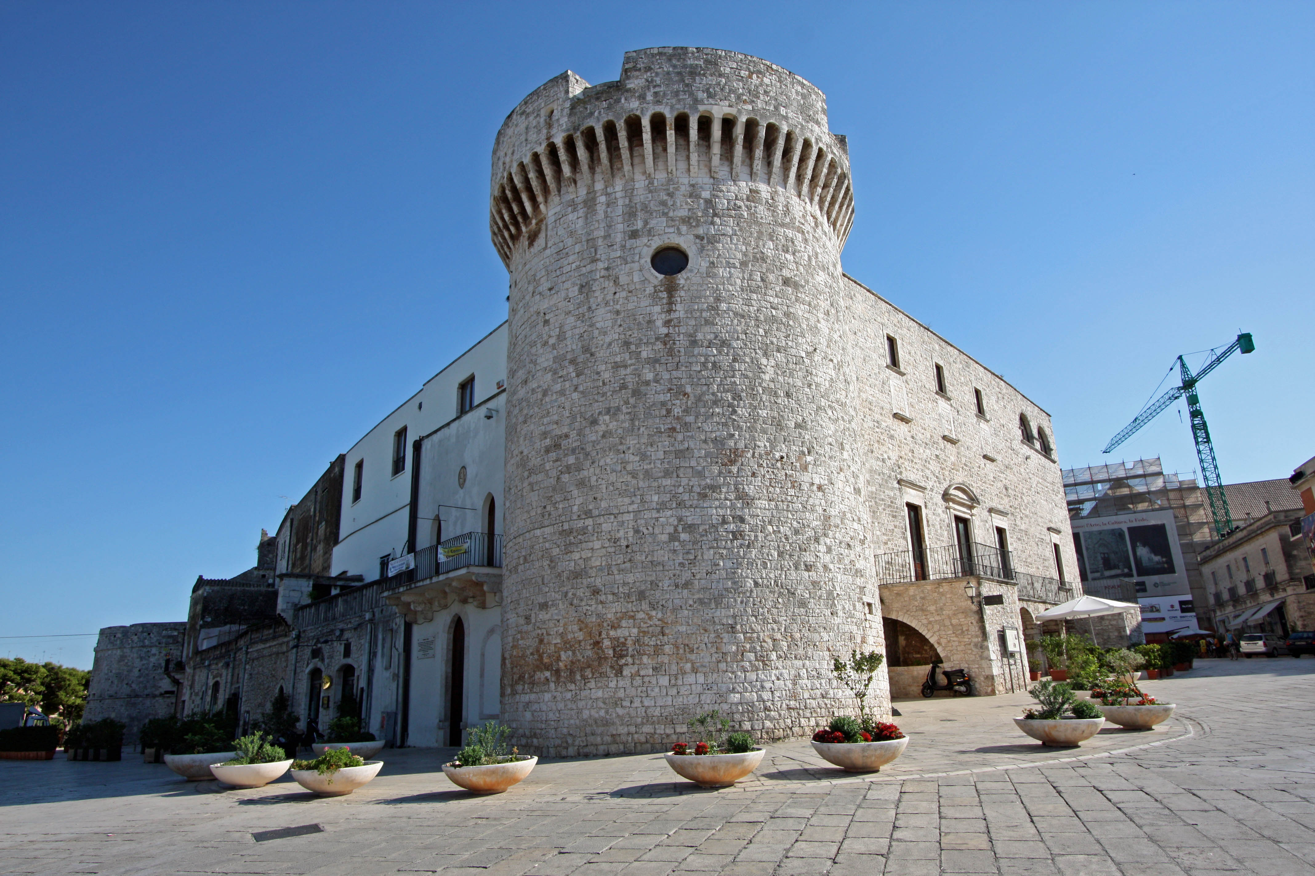 Conversano: Castello Acquaviva, Torre settentrionale